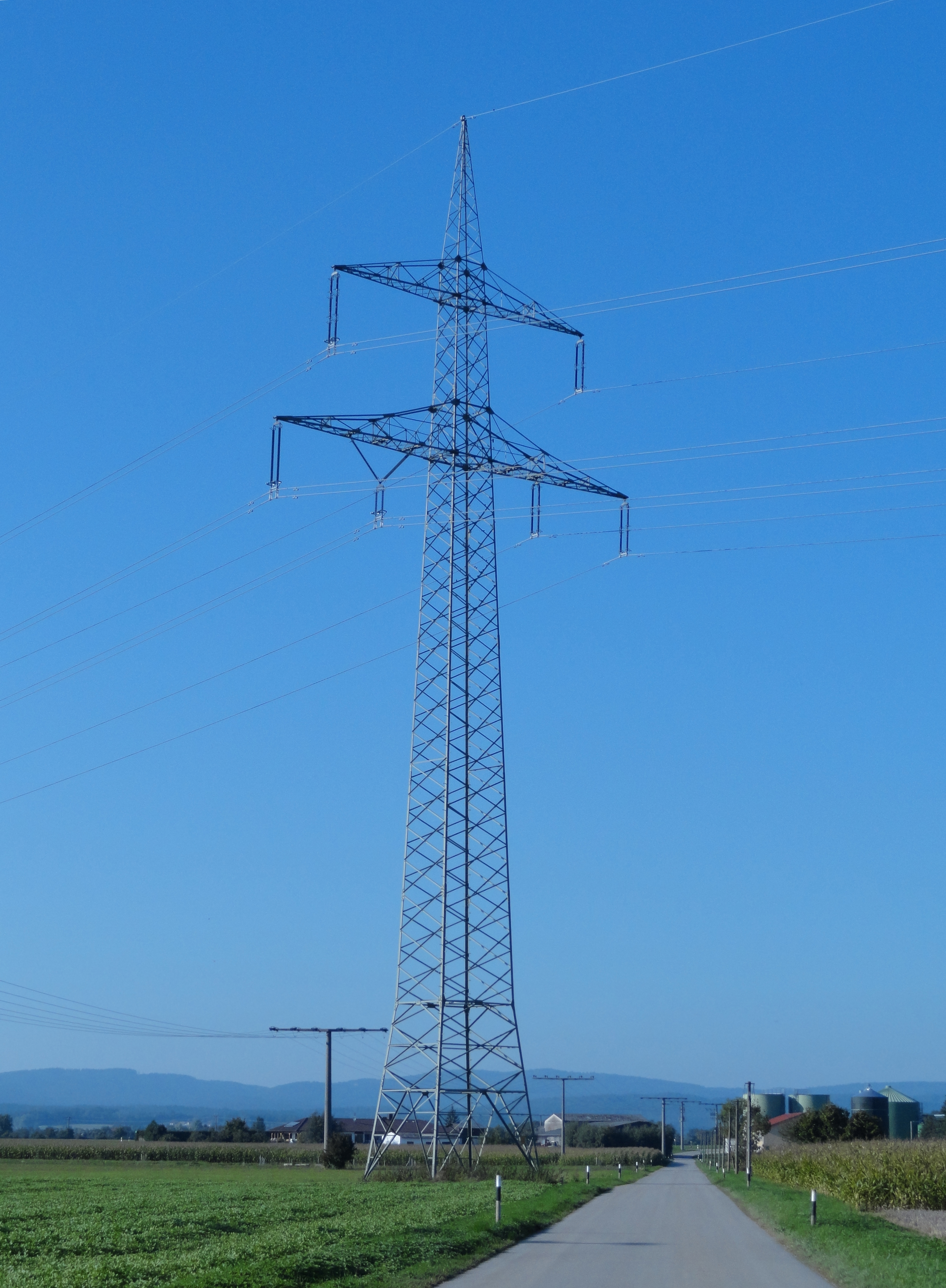 Tragmast (Nr. 116) der Höchstspannungsleitung Schwandorf–Pleinting bei Parkstetten